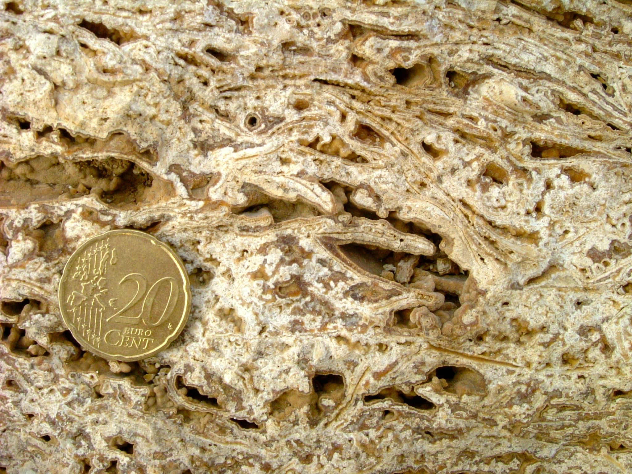 Nationaler Geotop: Travertine des Ilmtales, Travertin vom Steinbruch Ehringsdorf